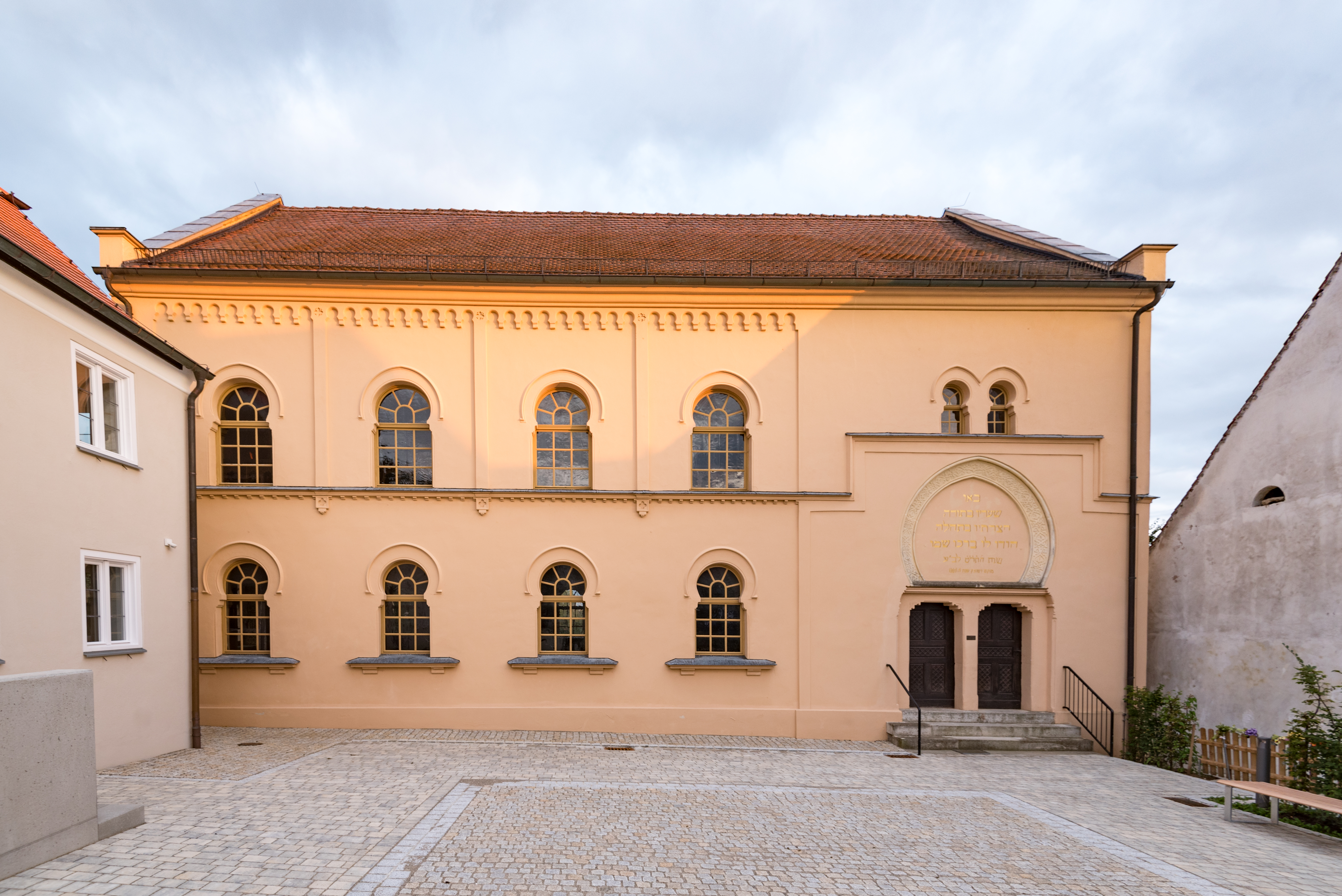 Hainsfarth, Jurastraße 10